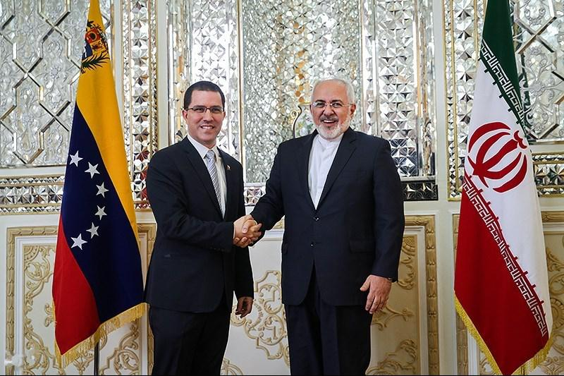 Venezuela’s Top Diplomat Visits Iran - TEHRAN (Tasnim) – Heading a diplomatic delegation, Foreign Minister of Venezuela Jorge Arreaza held a meeting with his Iranian counterpart Mohammad Javad Zarif in Tehran on Saturday.